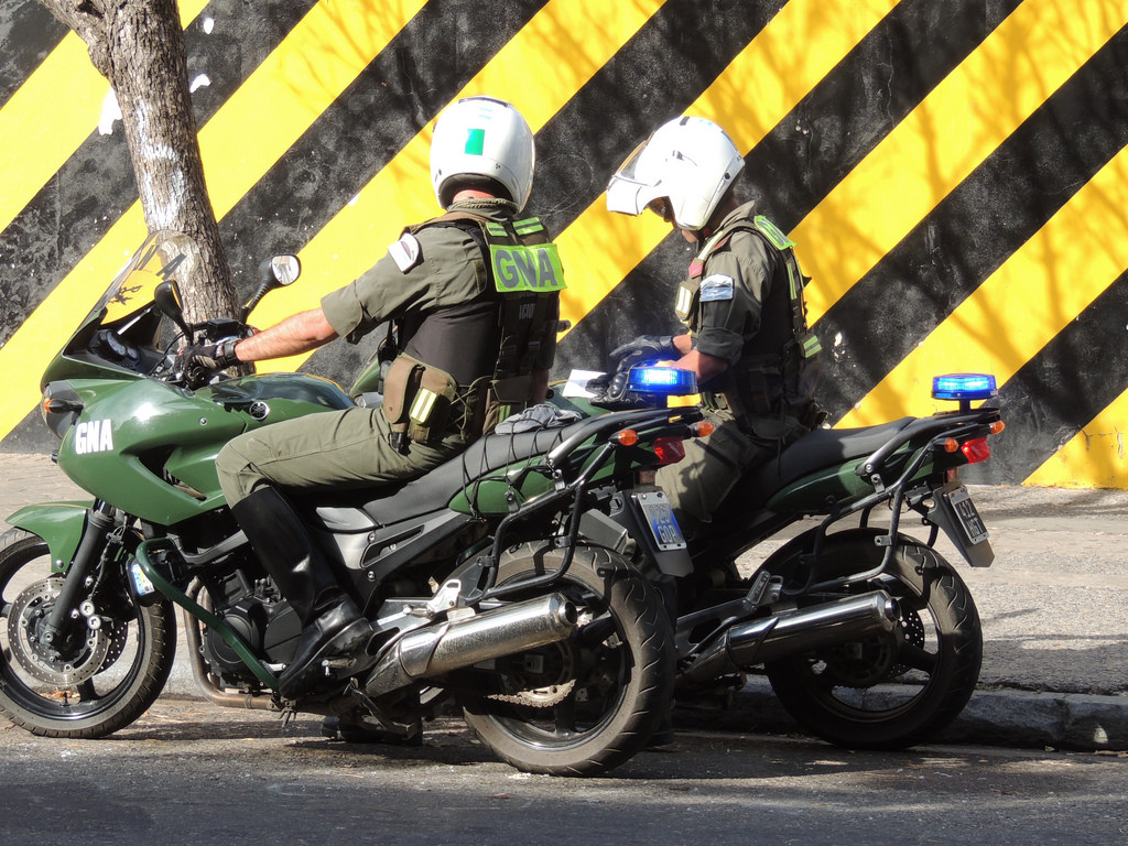 Dos efectivos motorizados de la Gendarmería Nacional Argentina (GNA) patrullando la ciudad de Rosario